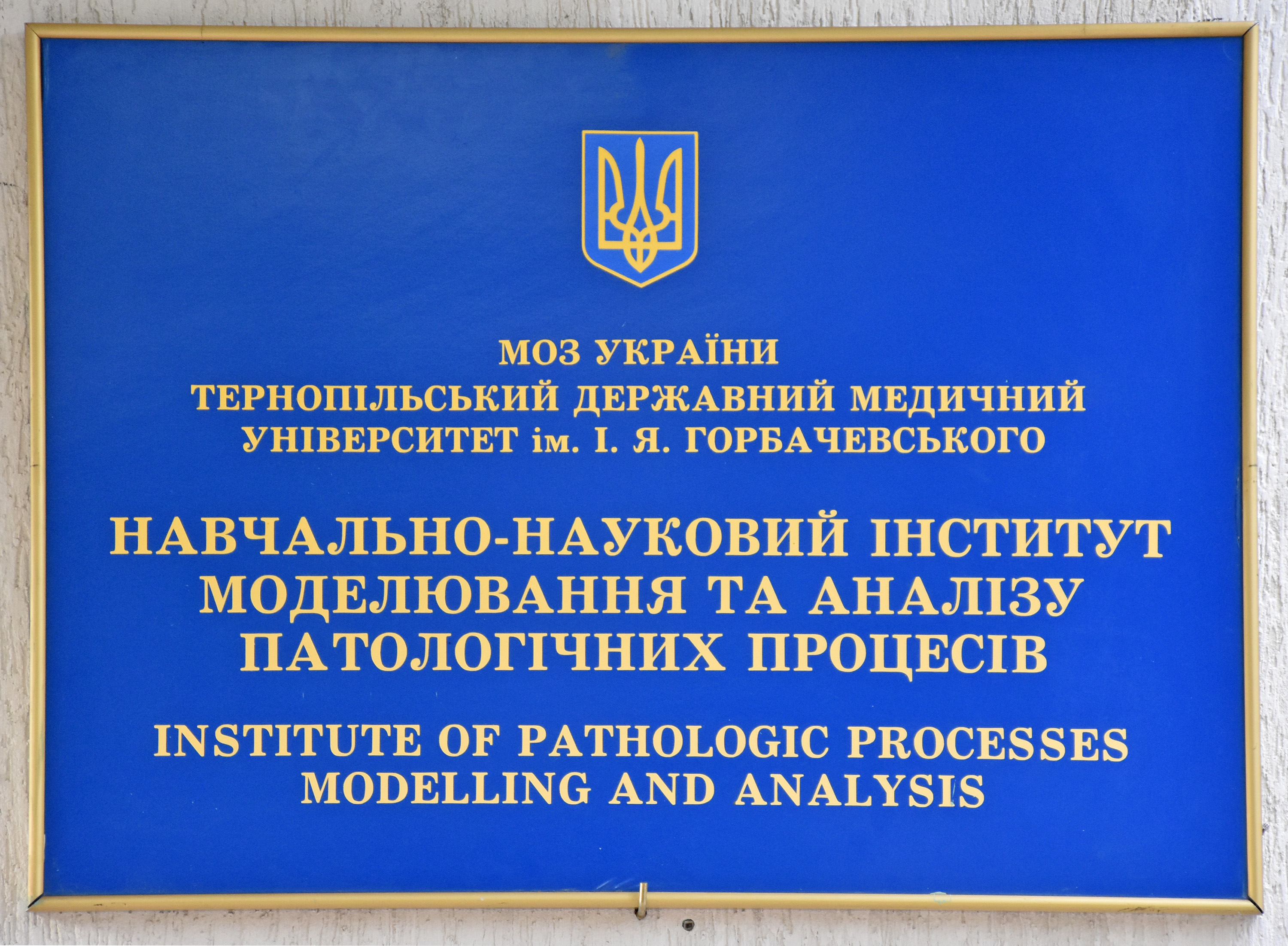 Навчально-науковий інститут моделювання та аналізу патологічних процесів Тернопільського державного медичного університету імені І. Я. Горбачевського на вул. Гетьмана Дорошенка, 7.